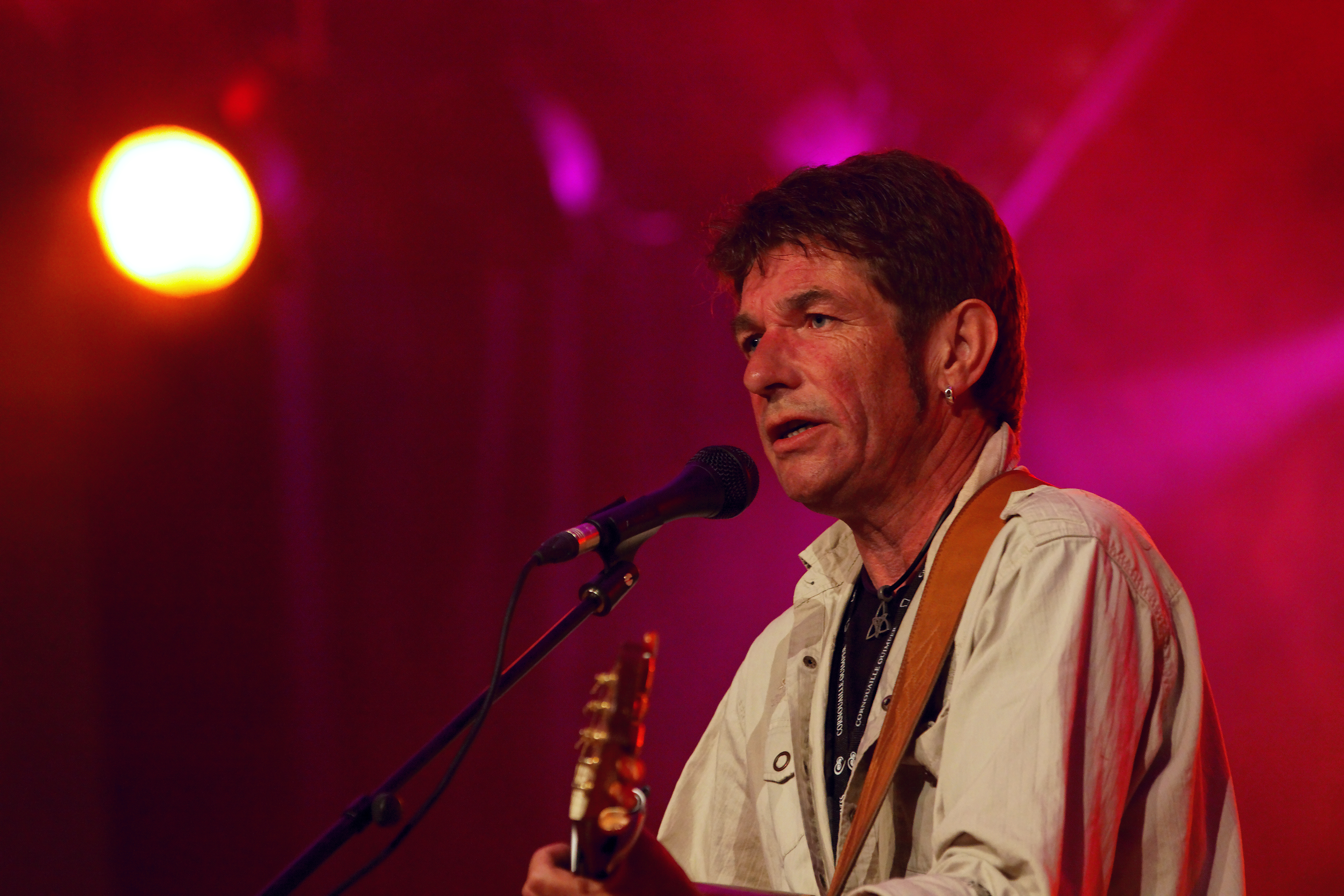 Dom Duff en concert le 22 juillet lors du festival de Cornouaille 2011.